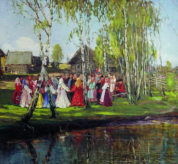 Хоровод